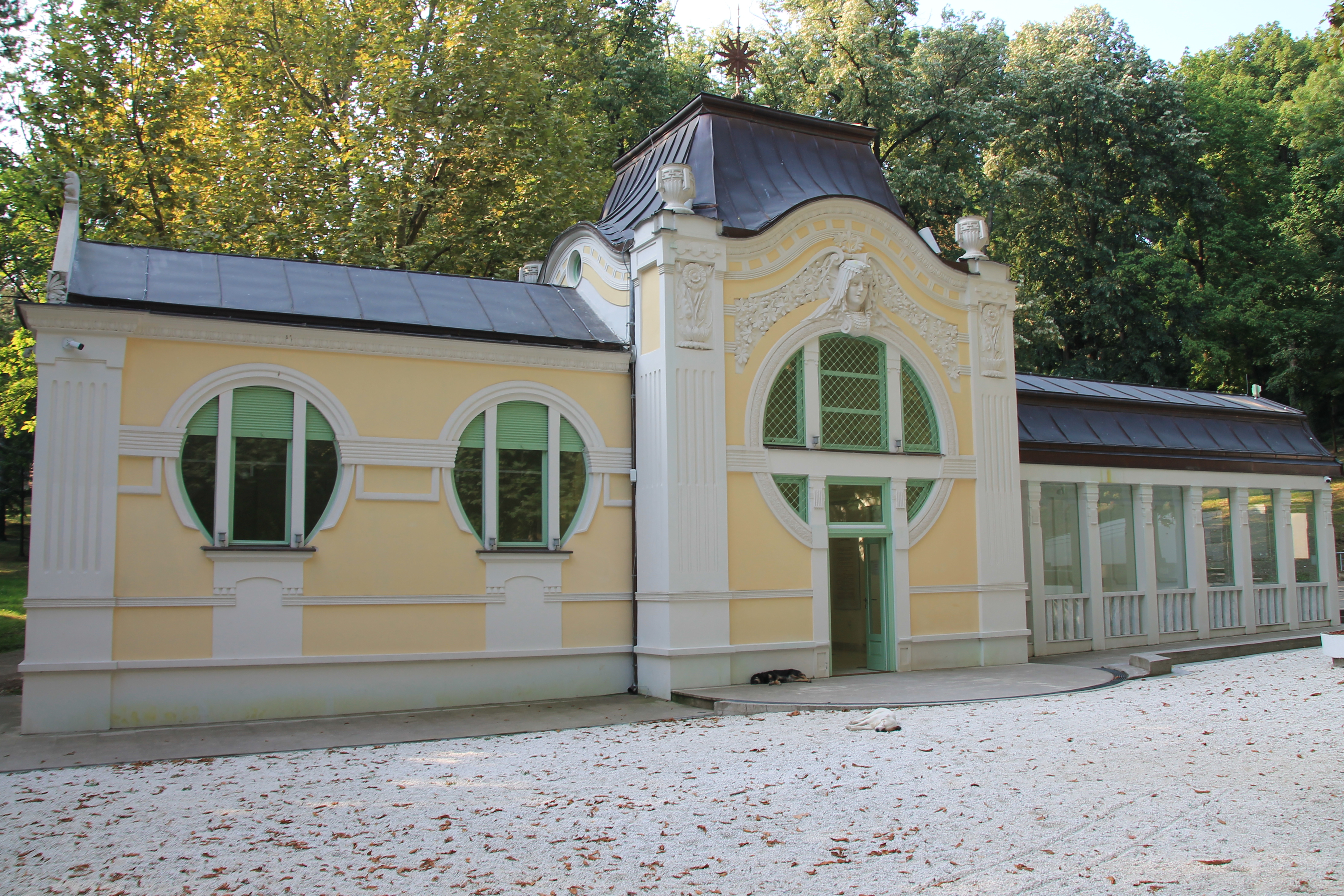 Bukovička banja